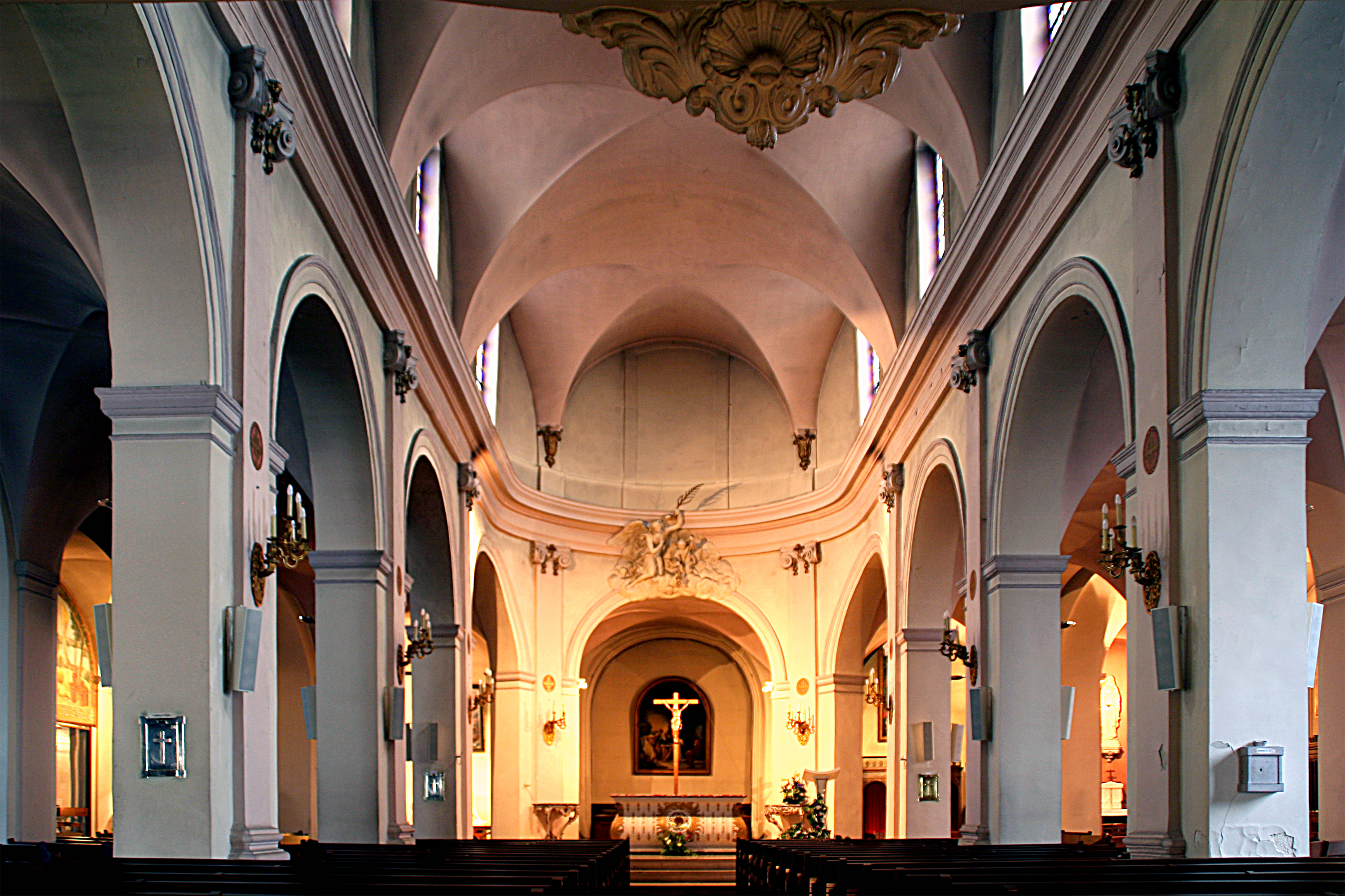 nef - intérieur de l'église Sainte-Geneviève